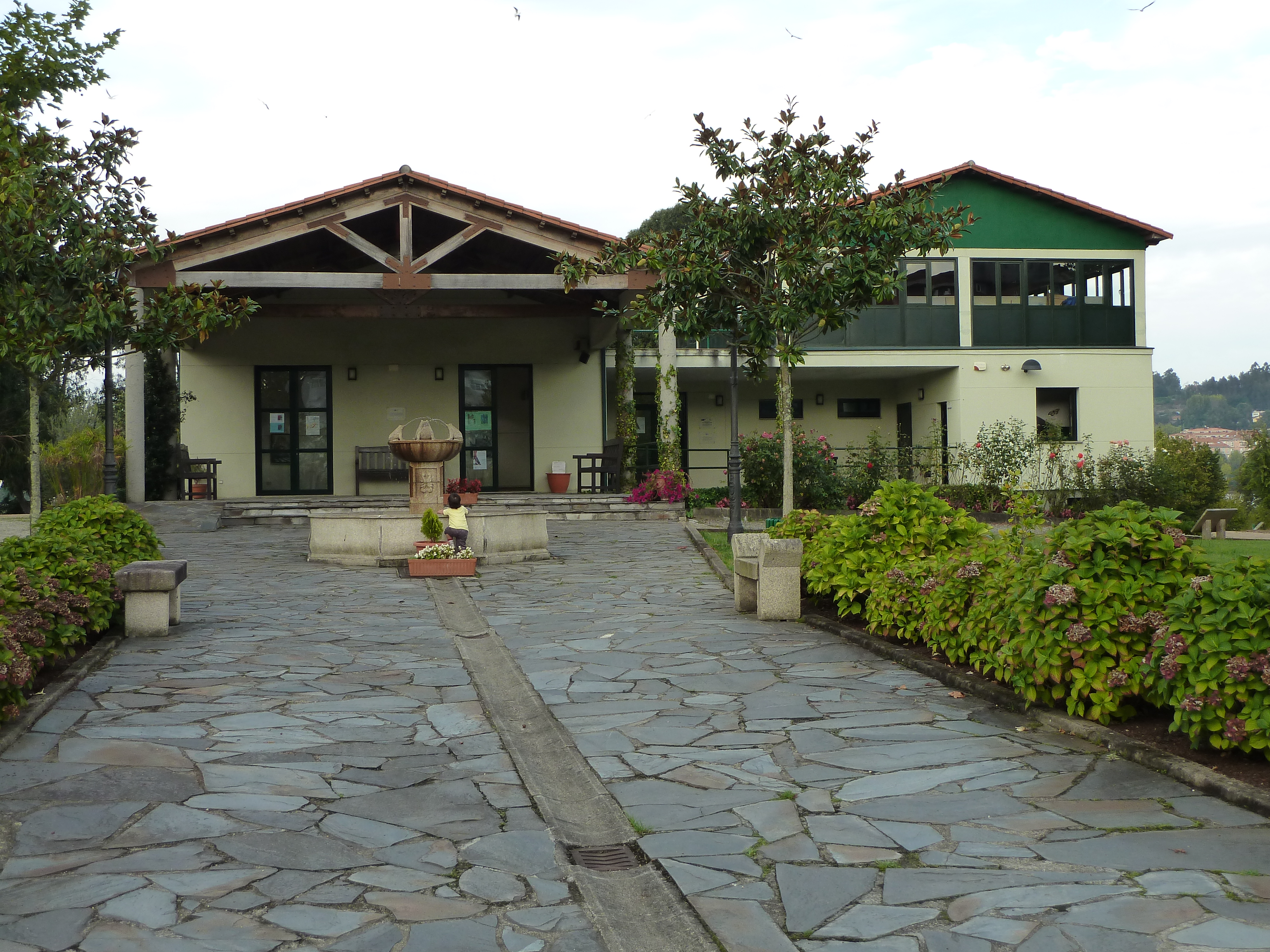 Edificio do Xardín Botánico Ría do Burgo no concello de Culleredo.